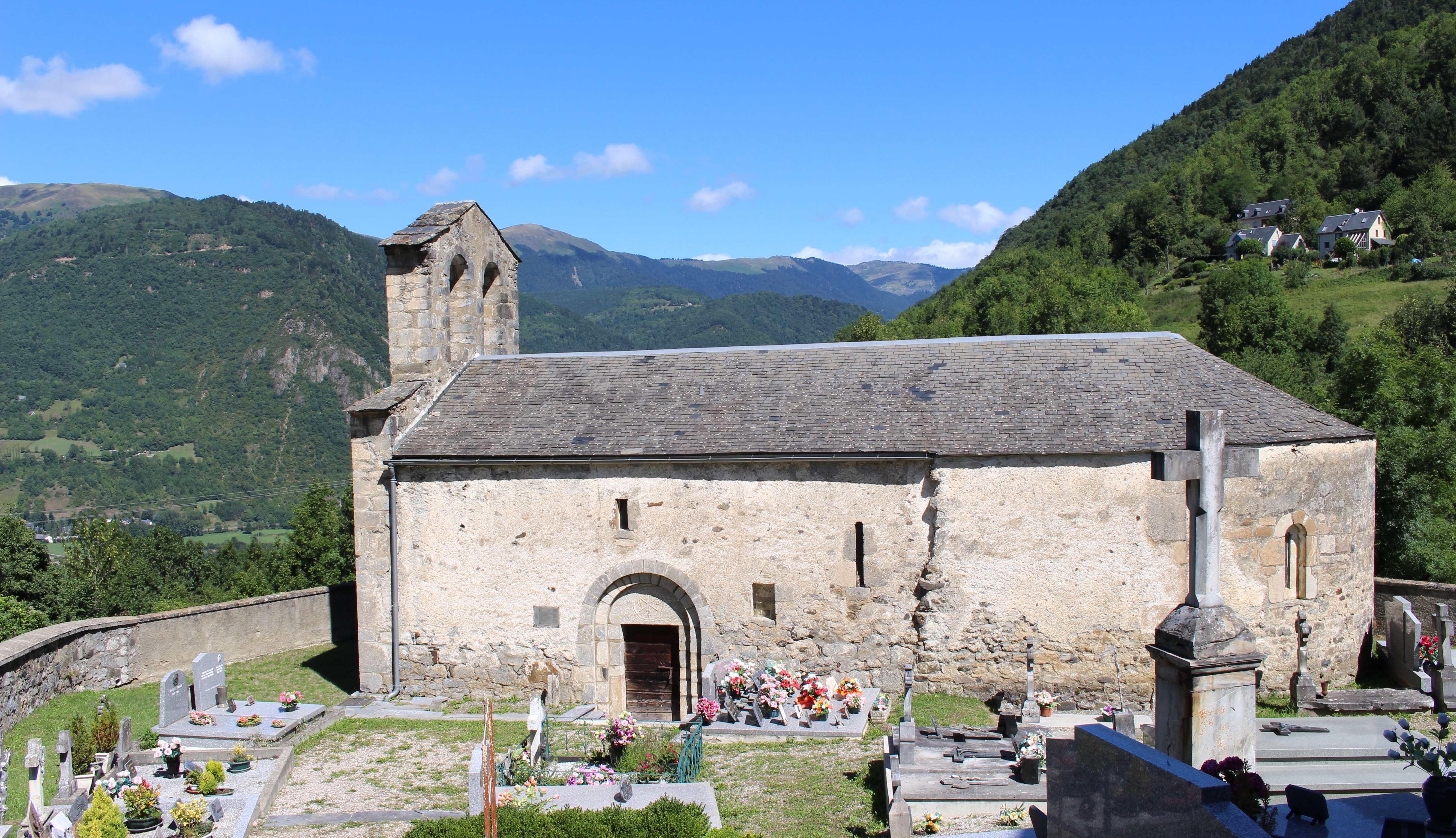 Chapelle Saint-Étienne de Gouaux (Hautes-Pyrénées)